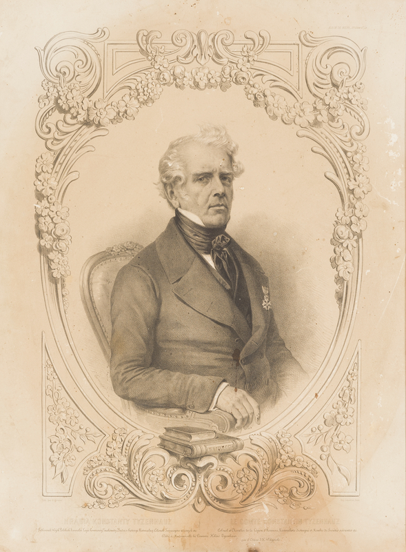 Беларуская (тарашкевіца): Партрэт Канстантына Тызэнгаўза (Kanstantyn Tyzenhaus)